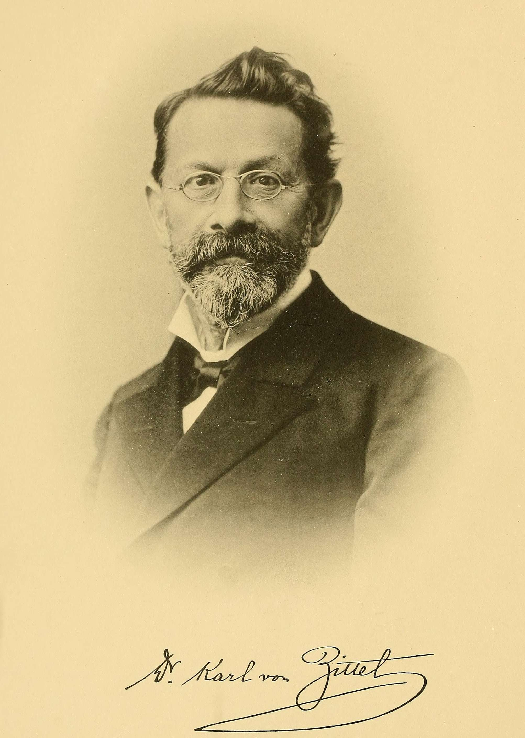 Porträt: Karl Alfred von Zittel (1839-1904), deutscher Paläontologe und Geologe. In: Palaeontographica. Fünfzigster Band. Sechste Lieferung April 1904. E. Schweizerbart'sche Verlagsbuchhandlung, Stuttgart 1903. 1904.